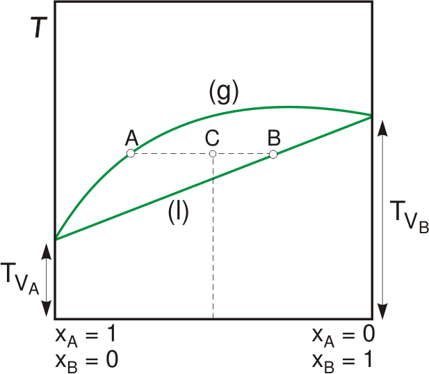 raoult´s law diagram